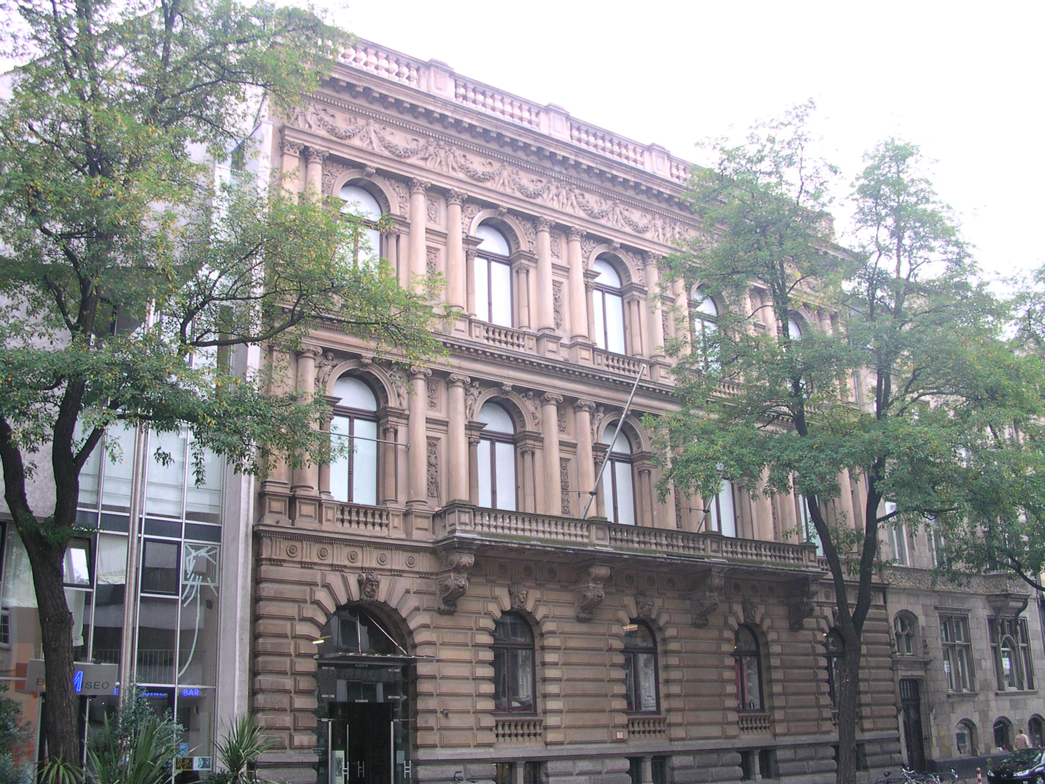 Aachen, Villa Cassalette (heute Suermondt-Ludwig-Museum) an der Wilhelmstraße